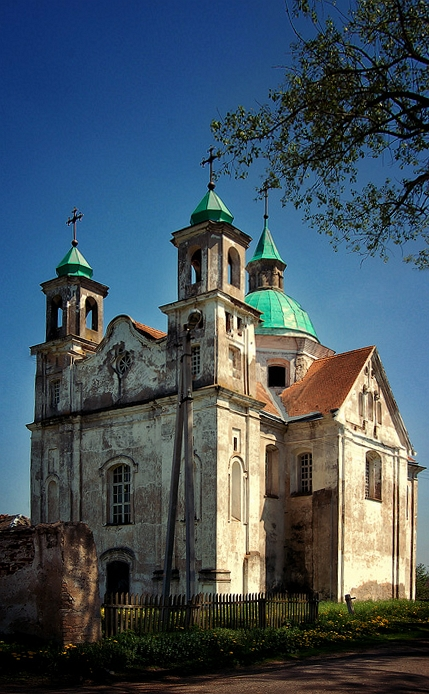 Беларуская (тарашкевіца): Траецкі касьцёл з брамай і агароджай. в. Беніца This is a photo of Belarusian heritage monument. Reference number: 612Г000297 ( WLM)